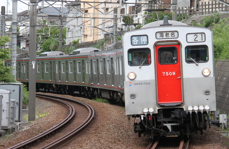 相模鉄道7000系電車